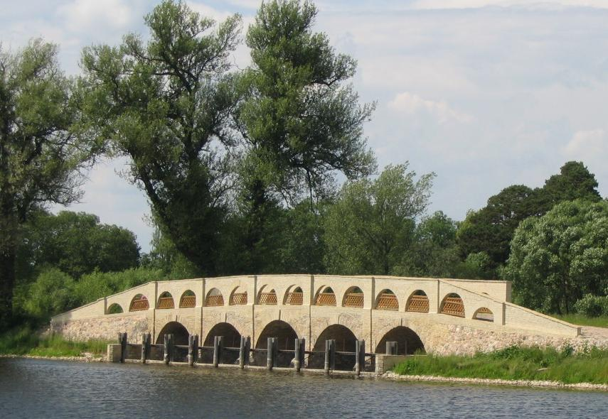 Pakruojo dvaras. Dolomitinis arkinis tiltas. 2005 m.